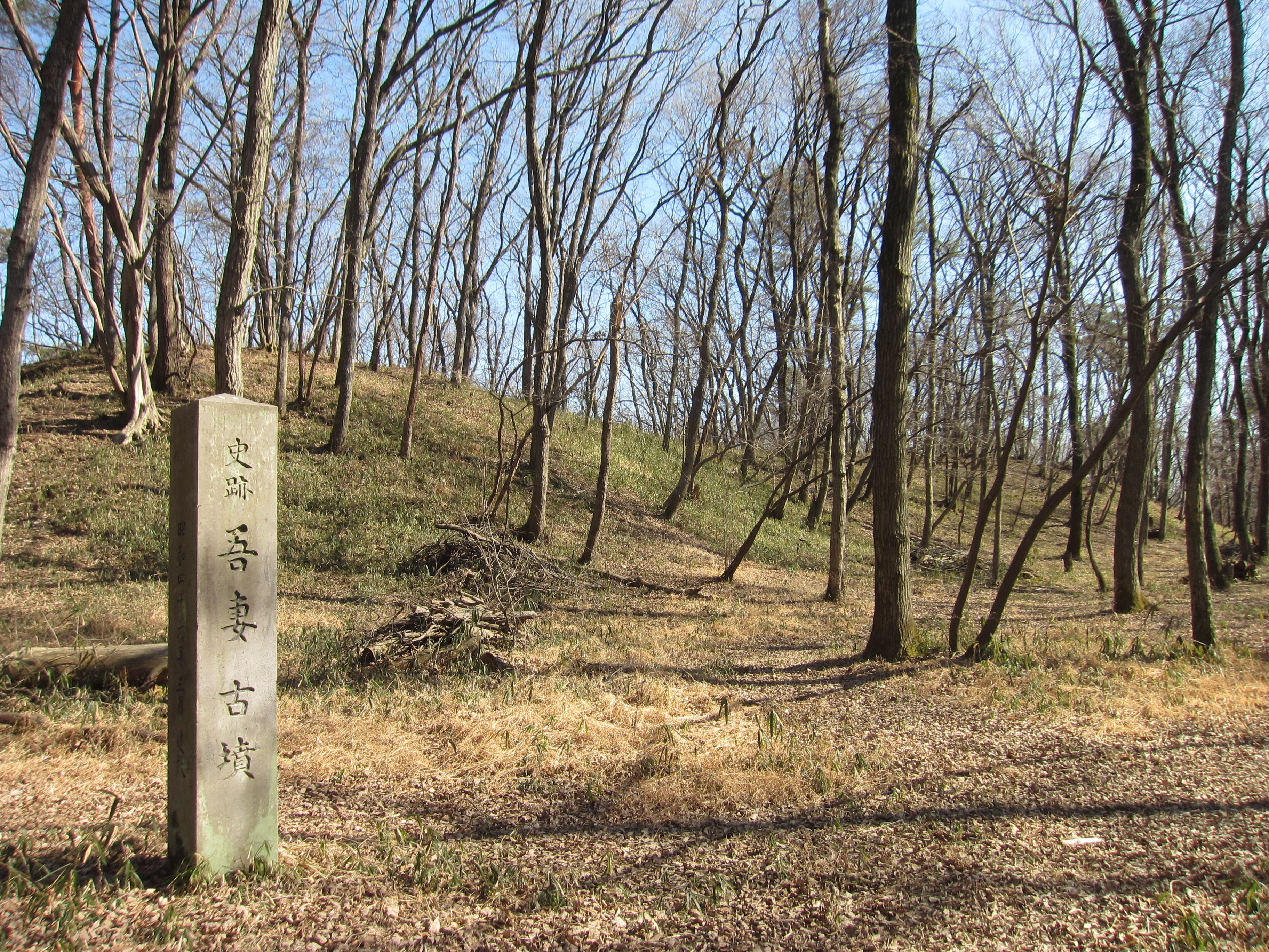 吾妻古墳 全景